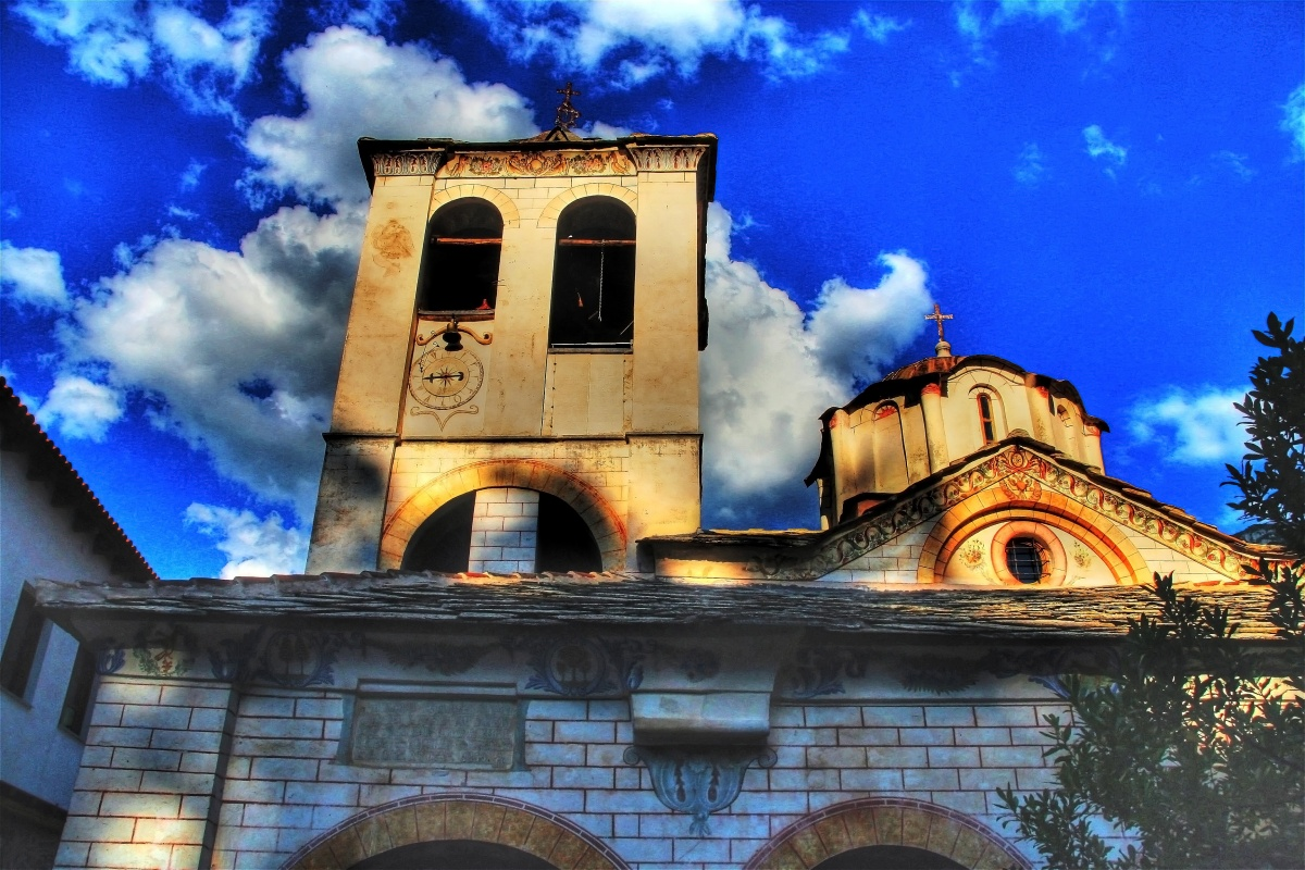 ΜΟΝΗ ΠΡΟΔΡΟΜΟΥ